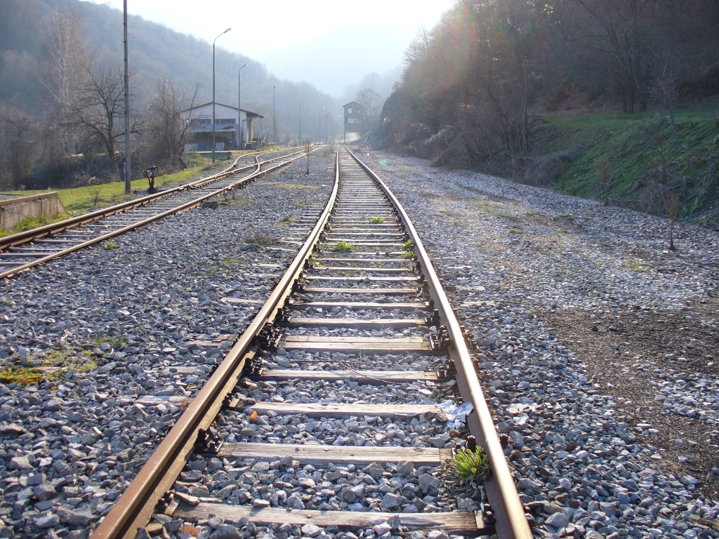 Tajmište mine.